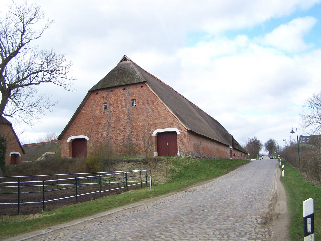 Gut Rixdorf